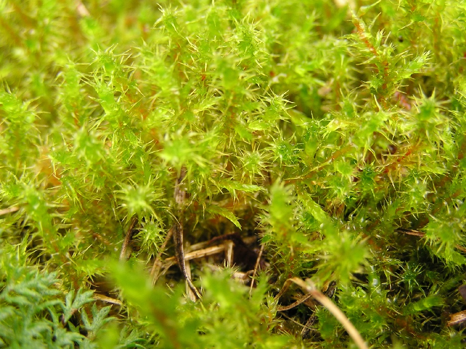 Rhytidiadelphus squarrosus in der Nähe der Ahr.